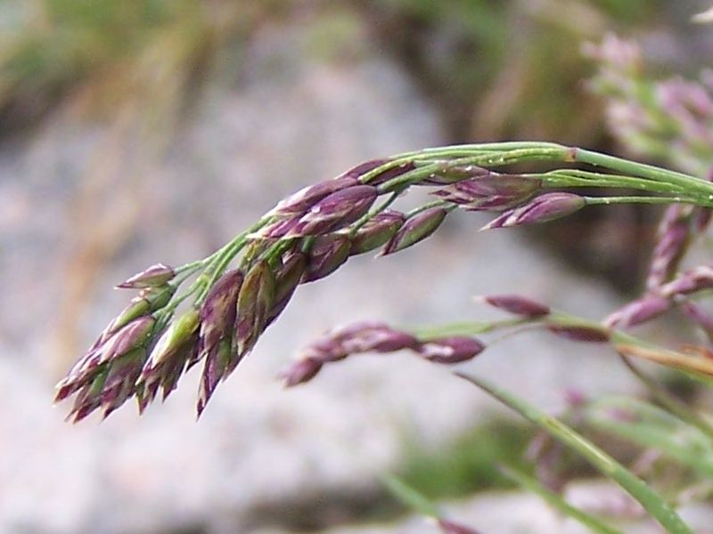 Poa laxa (pl.wiechlina wiotka), habitat: Tatra Mountains Kozi Wierch